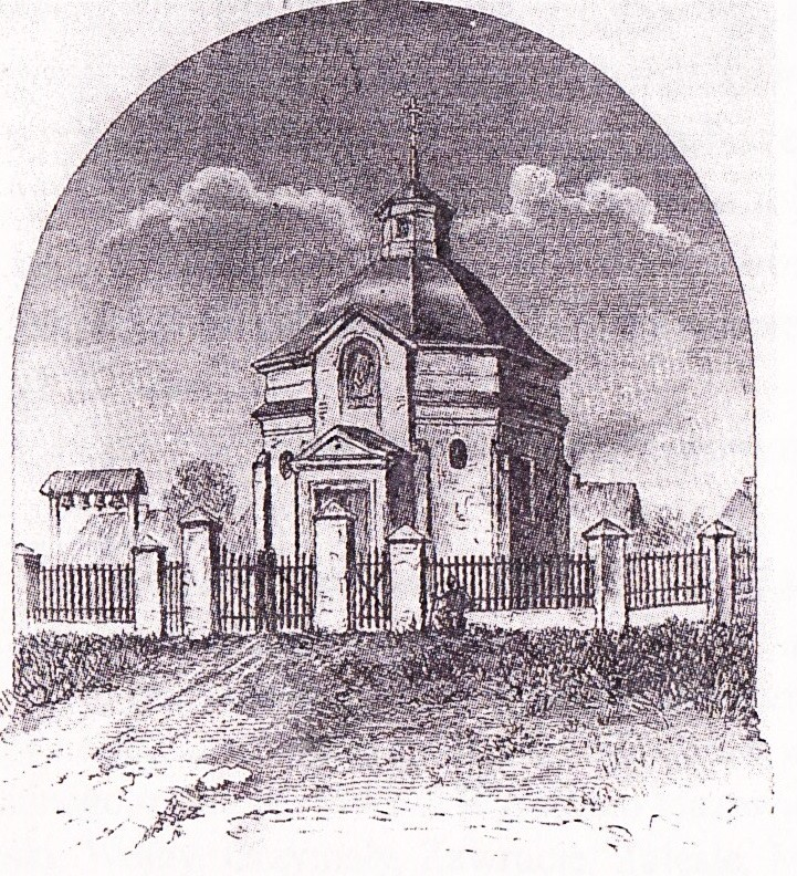 Cerkiew zbudowana w 1789 r. Stan z XIX wieku.